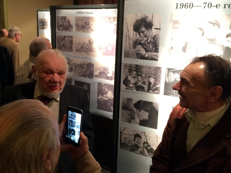 Ю. Г. Пузаченко на праздновании 120-летия со дня рождения П. П. Смолина